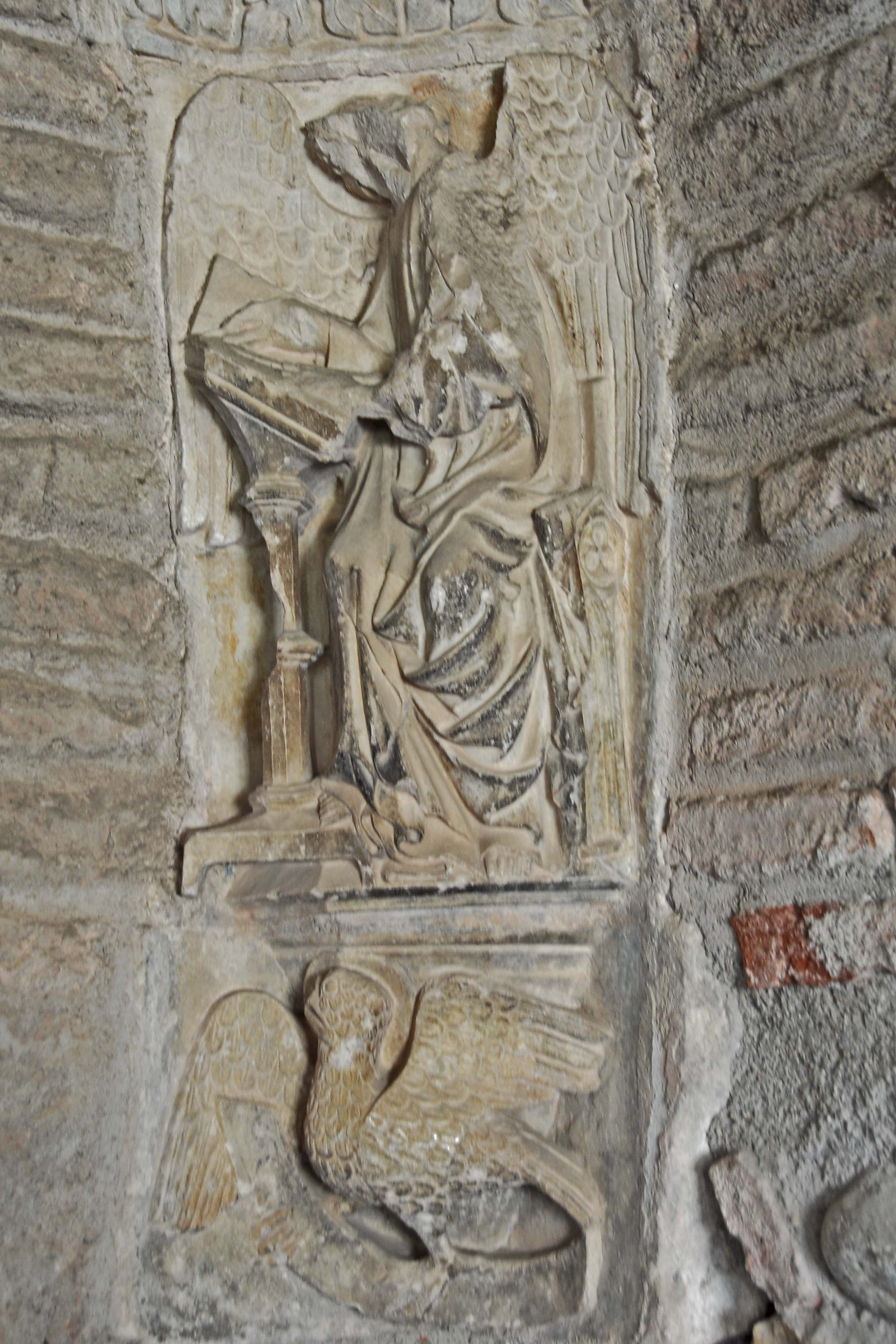 Ste-Eulalie-et-Ste-Julie_d’Elne, SW-Ecke Kreuzgang, Skulptur Erzengel